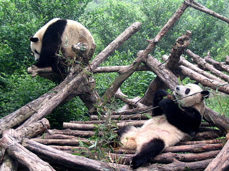 Pandy z Chińskiej Bazy Badawczo-Hodowlanej Pandy Olbrzymiej w Chengdu